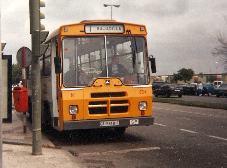 Autobús Pegaso de la compañía Cooperativa de Transportes de Marruecos prestando servicio urbano en Algeciras en 1998